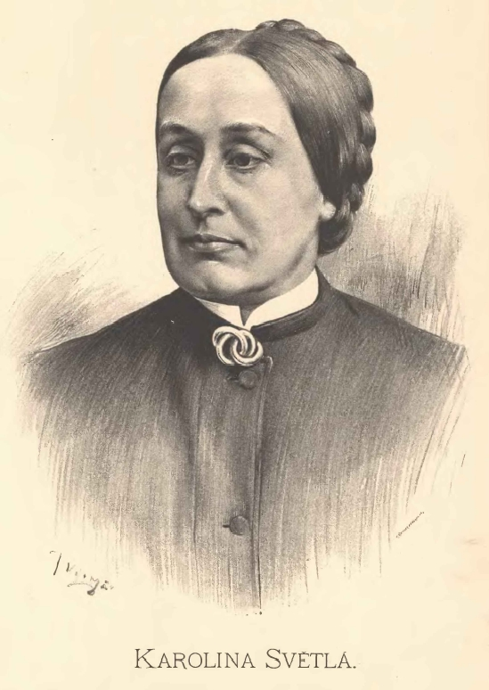 Portréty předních osobností od Jana Vilímka